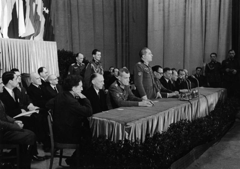 Berlin November 1944 General Wlassow in Berlin. Das kürzlich gegründete Komitee zur Befreiung der Völker Rußlands hielt nunmehr seine erste Groß-Kundgebung in der Reichshauptstadt ab. General Wlassow sprach vor Ostarbeitern, Offizieren und Soldaten der Befreiungsarmee über sein Kampfprogramm zum Sturze der bolschewistischen Tyrannei. Auf der Bühne hat das Präsidium des Komitees Platz genommen. Ein Offizier der Befreiungsarmee eröffnet die Kundgebung. [Wlassow rechts neben dem Redner] SS-PK. Bogner